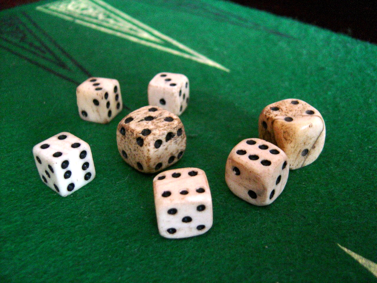 anciens dés en os